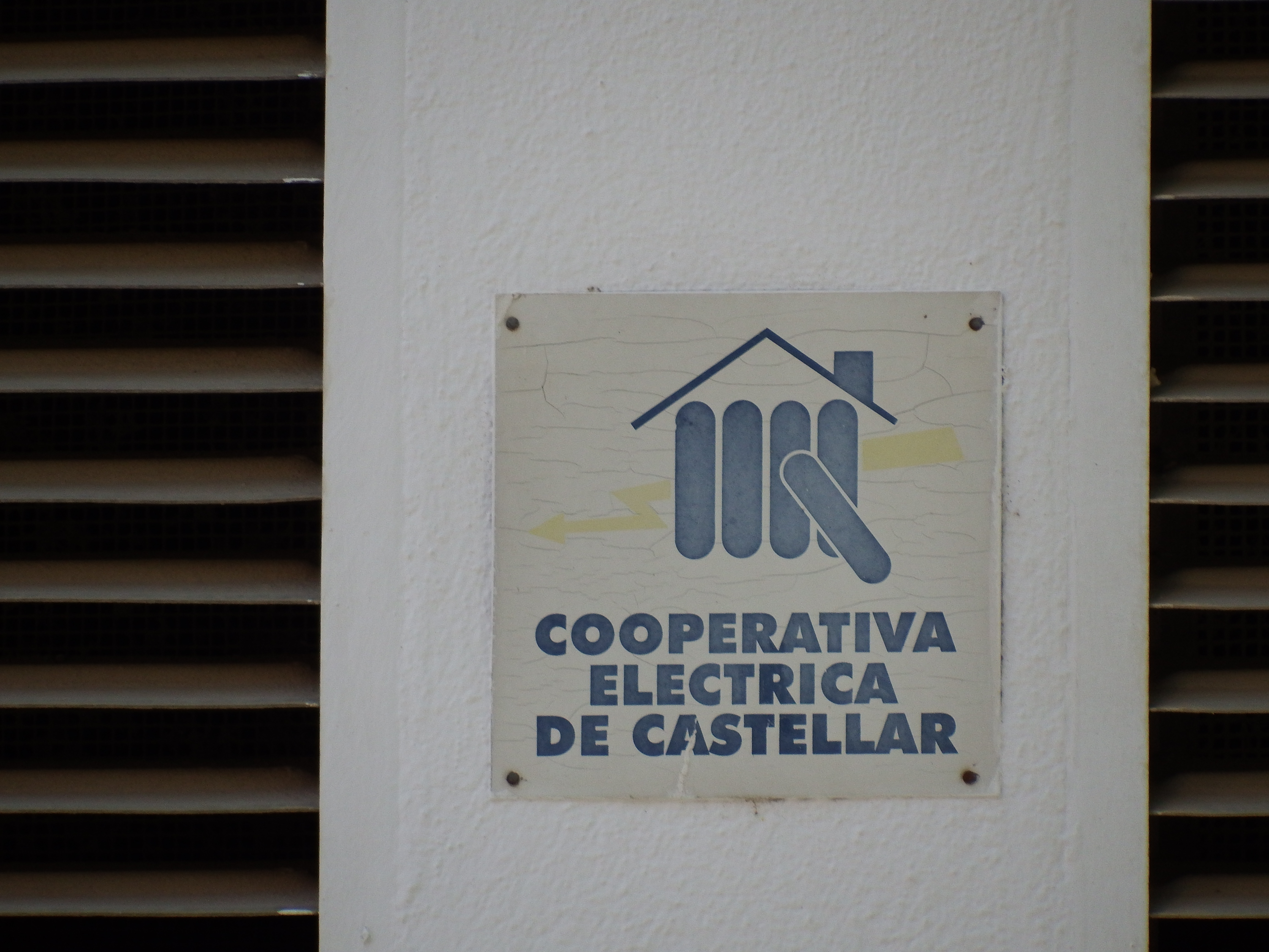 Placa de la Cooperativa eléctrica de Castellar